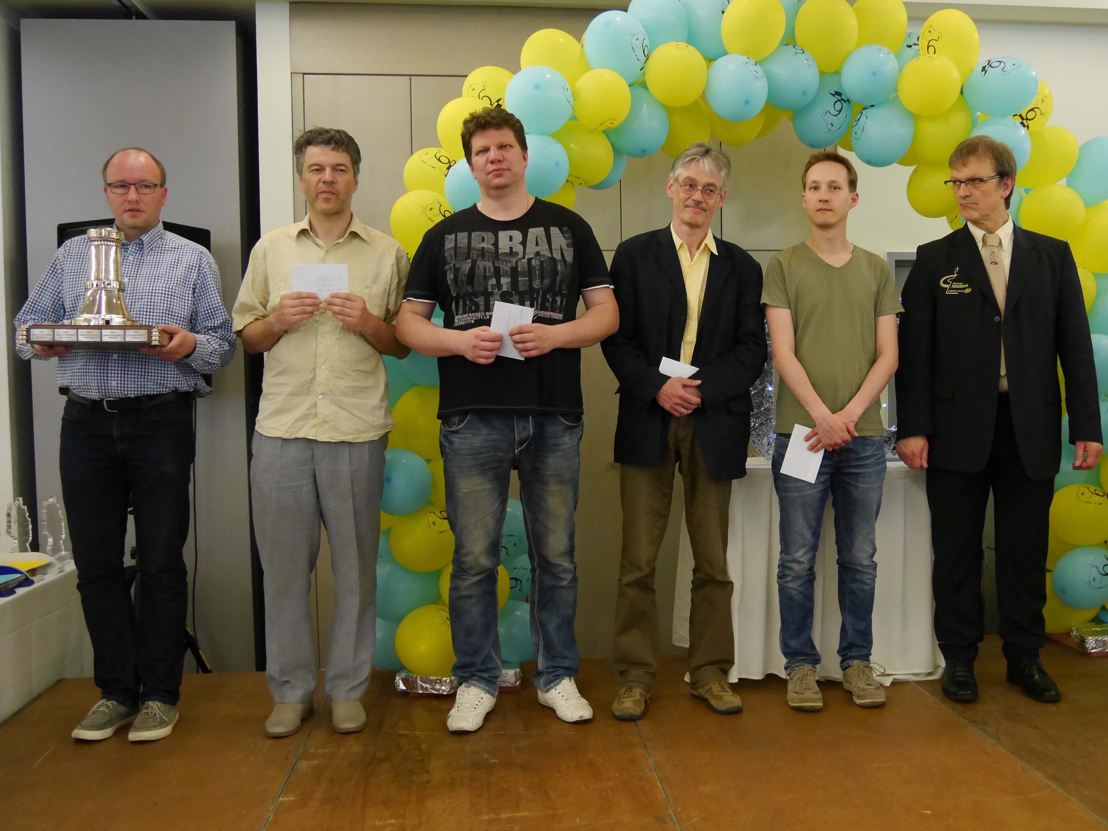 Siegerehrung Dähnepokal 2016 in Halle an der Saale. Von links nach rechts die ersten Fünf: Sven Telljohann, Hans-Elmar Schwing, Michael Kopylov, Hartmut Zieher und Gordon Andre. Rechts daneben steht Herbert Bastian, DSB-Präsident.